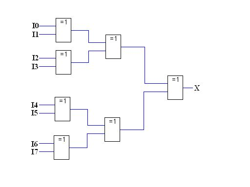 8-Bit Paritätsgenerator